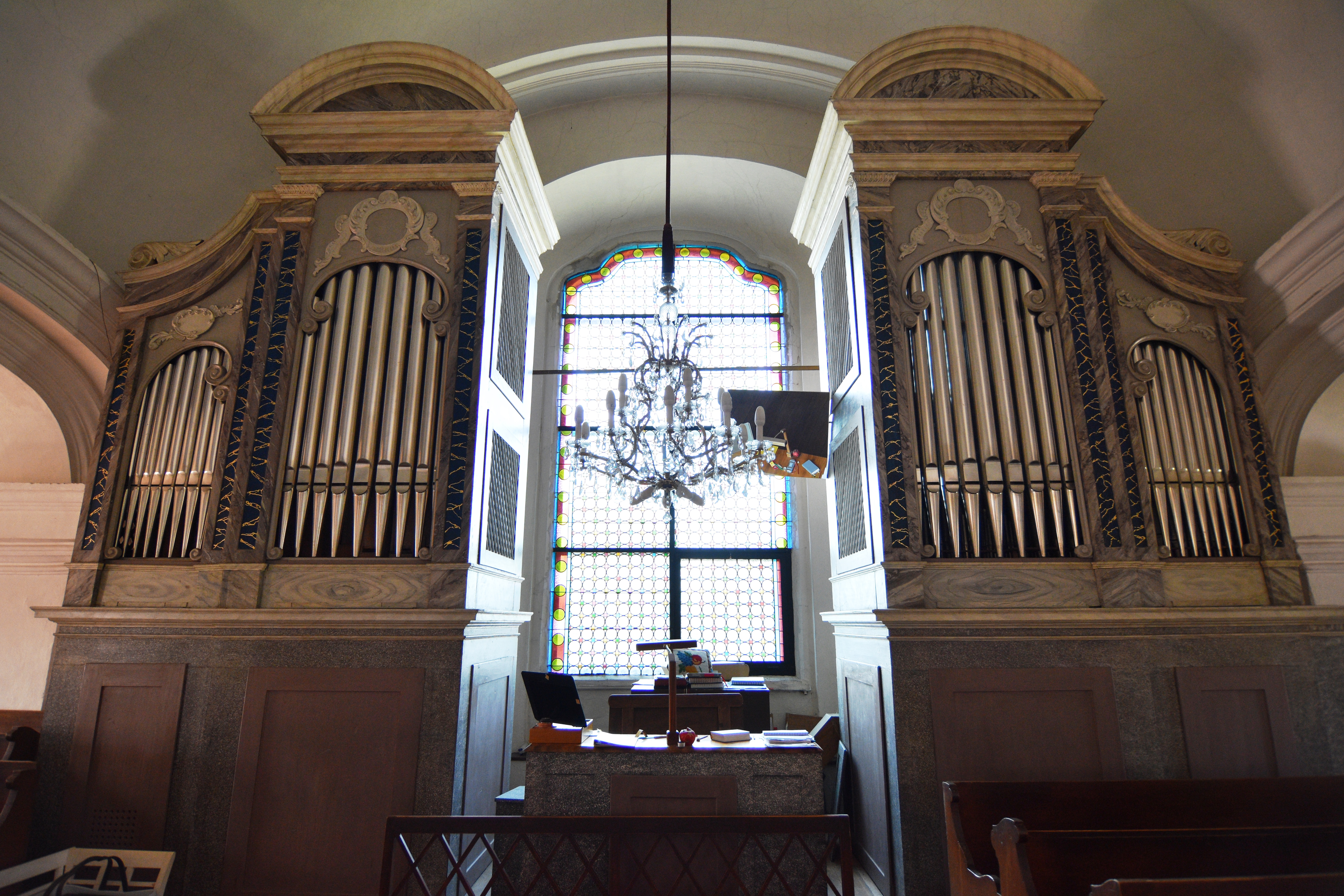 Pfarrkirche hl. Bartholomäus, Mureck Interior